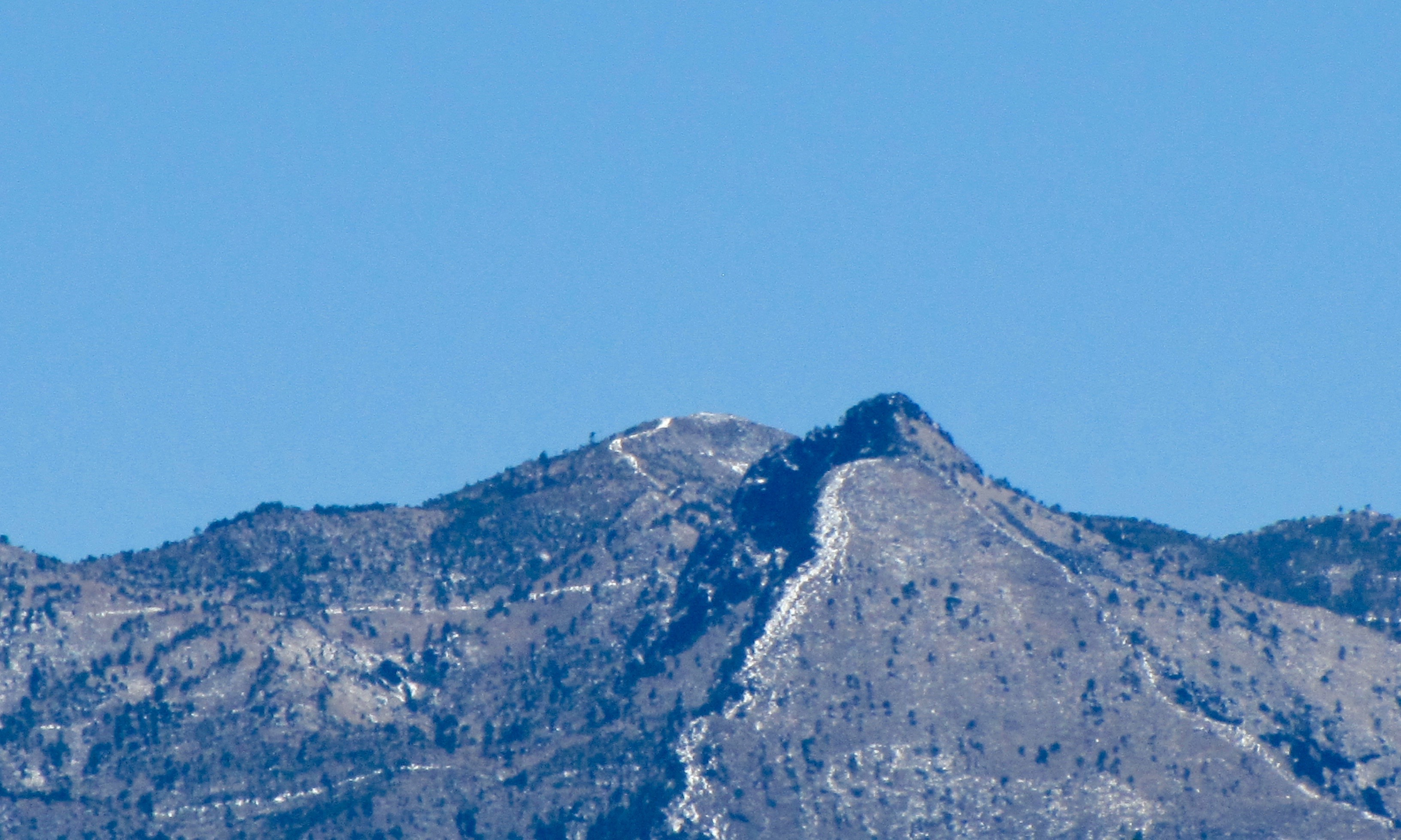 El Pico del Águila, la máxima cumbre del Ajusco, visto desde el sur de la Ciudad de México (11-III-2016).